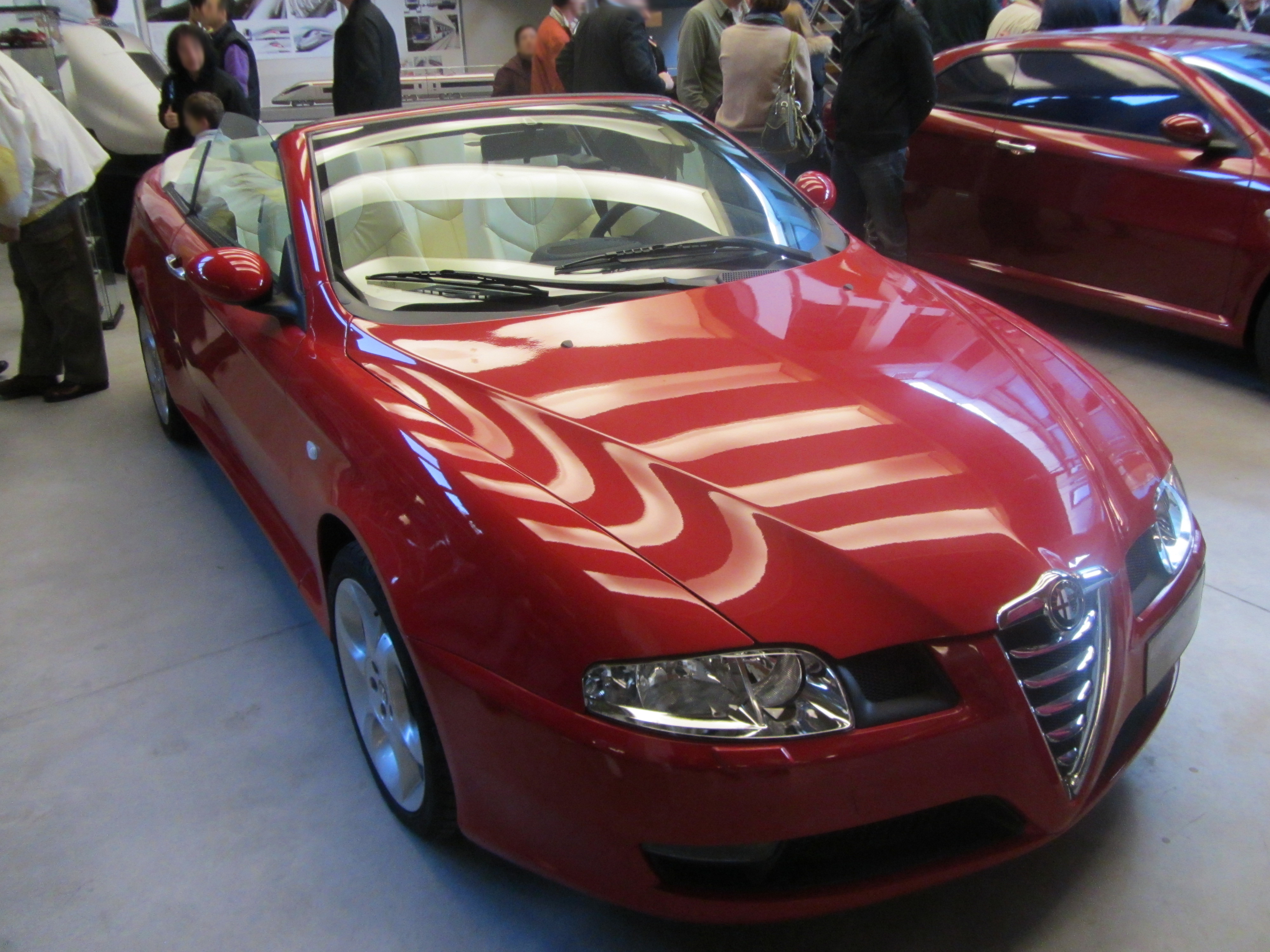 Alfa Romeo GT cabrio concept al Museo Bertone